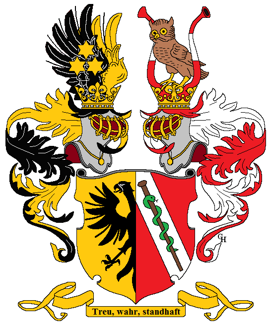 Wappen des k.u.k. Hofarztes Dr. August Bielka (1828–1909), langjähriger Leibarzt des Erzherzogs Franz Karl von Österreich (1802–1878), verliehen anlässlich seiner Erhebung in den österreichischen Ritterstand mit dem Prädikat "von Karltreu" 1878. Zeichnung von Gerd Hruška ( Für weitere Informationen zu dieser Standeserhebung siehe (